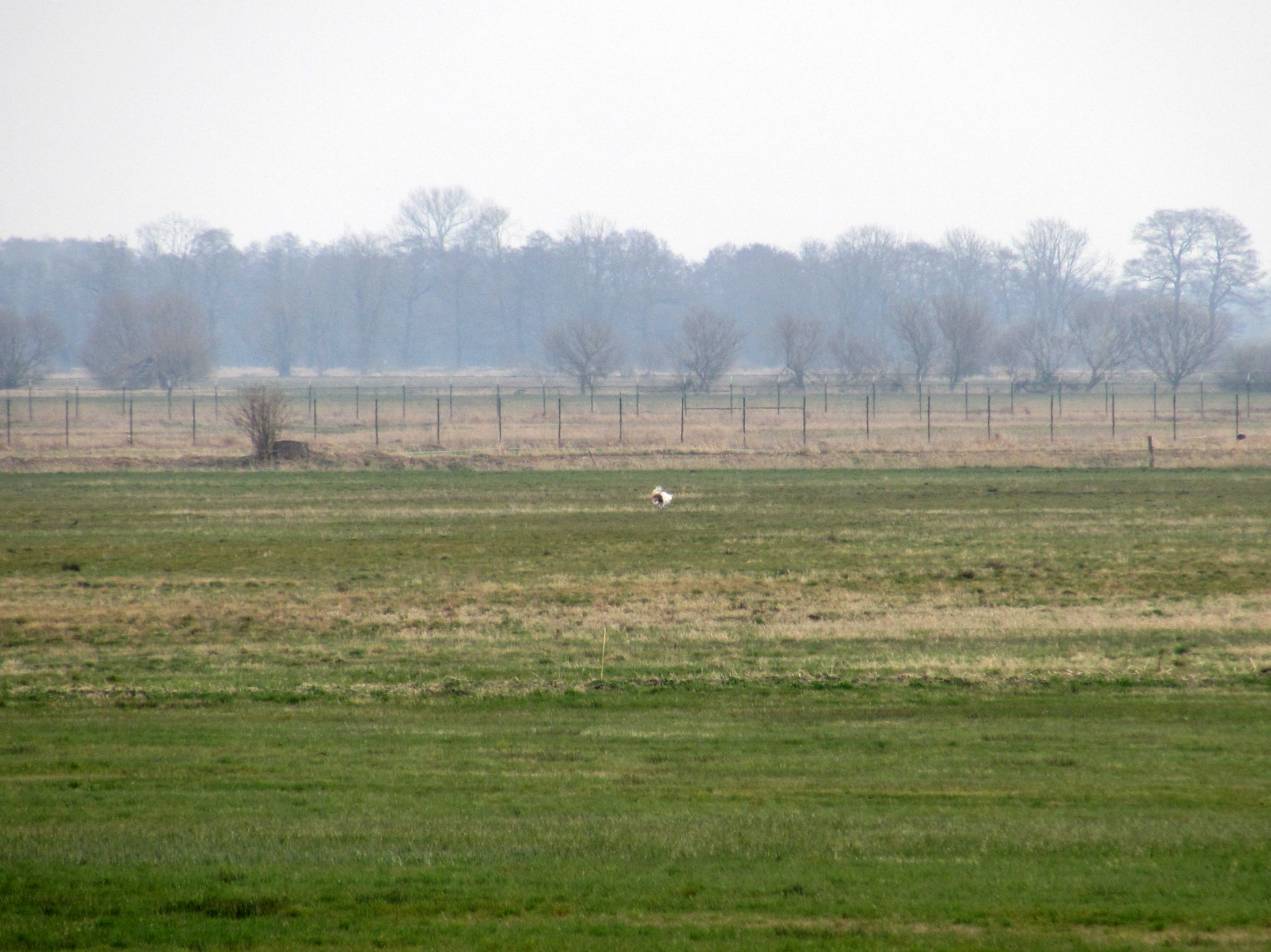 Vom Vogelbeobachtungsturm Königsrode Blick über das Fiener Bruch;im Hintergrund umzäuntes Areal zum Schutz der Großtrappen, davor ein balzener Hahn